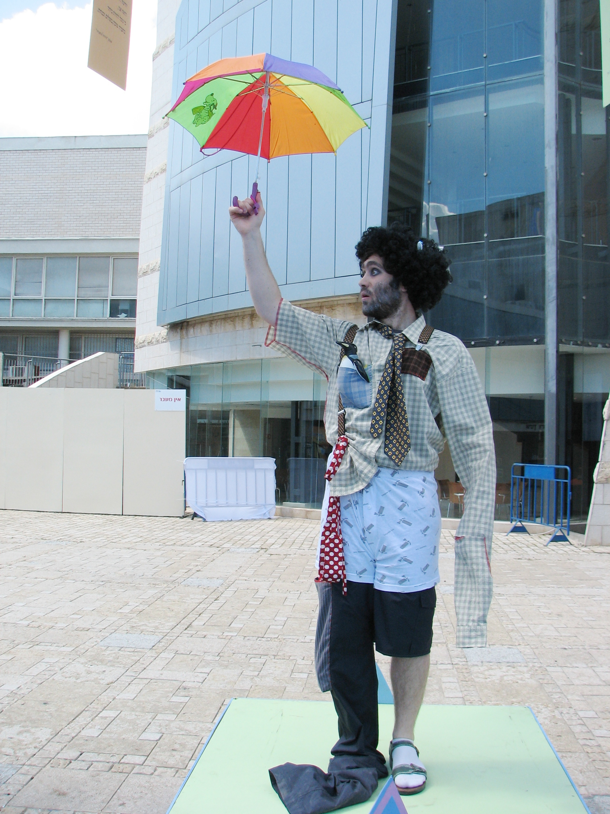 The 21 Haifa International Children's Theater Festival. The festival has become a tradition that occures annually, during the Passover Holiday. פסטיבל חיפה הבינלאומי להצגות ילדים הוא פסטיבל לתיאטרון ילדים, המתקיים בחיפה מדי שנה בימי חול המועד פסח. בשנת 2011 נערך הפסטיבל בפעם ה-21. הפסטיבל נערך במשכן תיאטרון חיפה שבשכונת הדר הכרמל, בגן בנימין הסמוך לו ובאתרים נוספים בשכונה, ובכללם מוזיאון המדעטק. התפיסה האמנותית של הפסטיבל היא הפיכת ההצגות המועלות באולמות והאירועים שמחוץ להם להפנינג לילדים. הפסטיבל אורך כשלושה ימים, שבמהלכם מועלים עשרות הצגות ומופעים. פסטיבל-21 הוקדש לספריה של לאה גולדברג פסל חי, המפוזר מכפר אזר